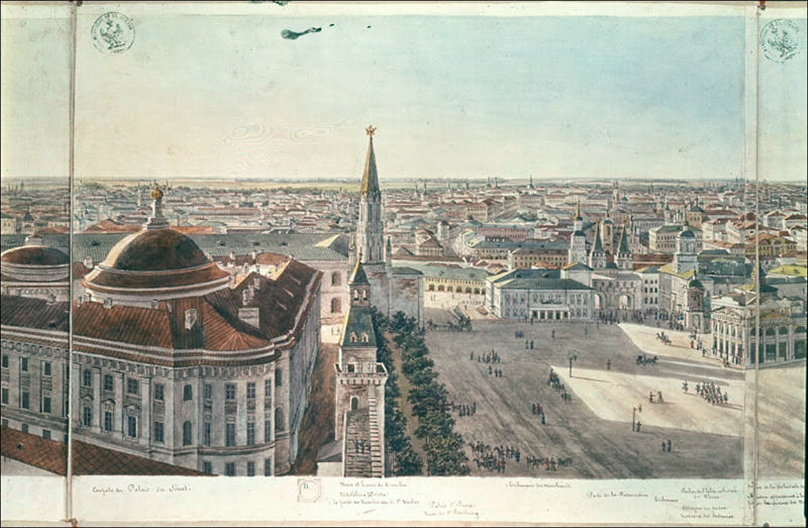 Панорама Москвы 20-ых годов XIX века